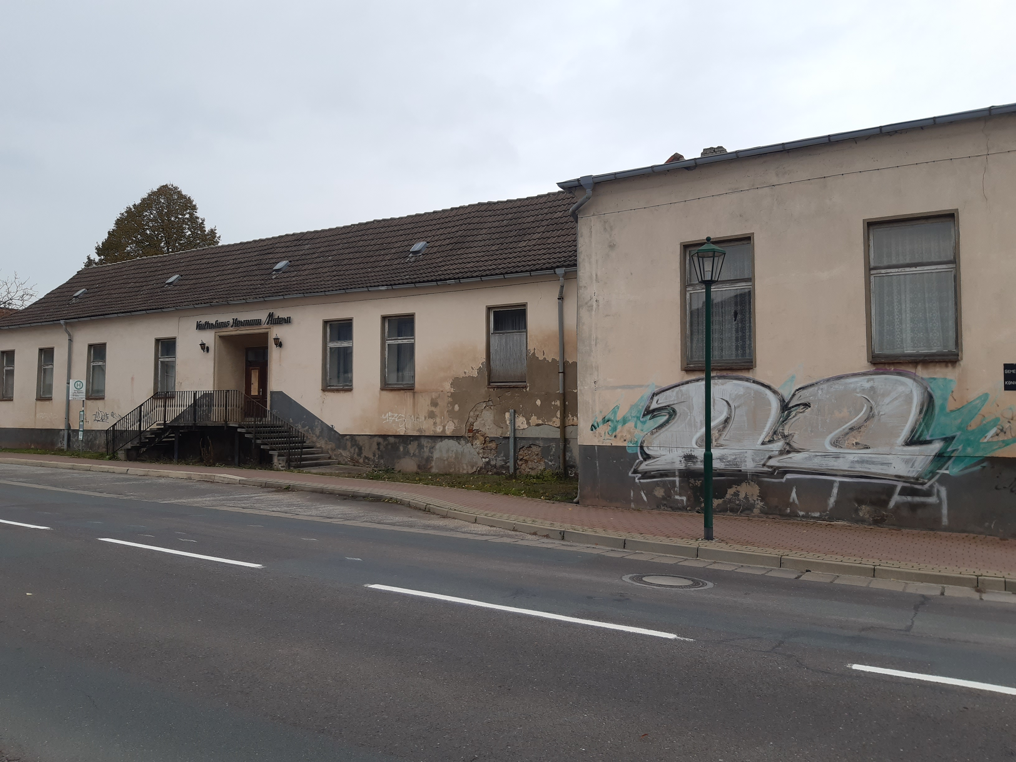 Kulturhaus